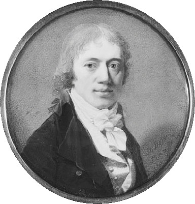 Anders von Wahrendorff (1759-1848), tysk riksfriherre, bergsråd, gift med Maria Charlotta Holterman, ägare av Taxinge-Näsby slott